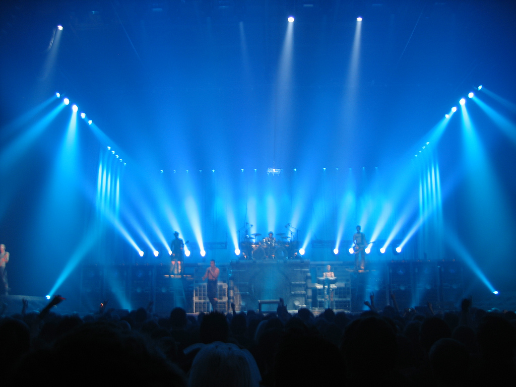 Rammstein